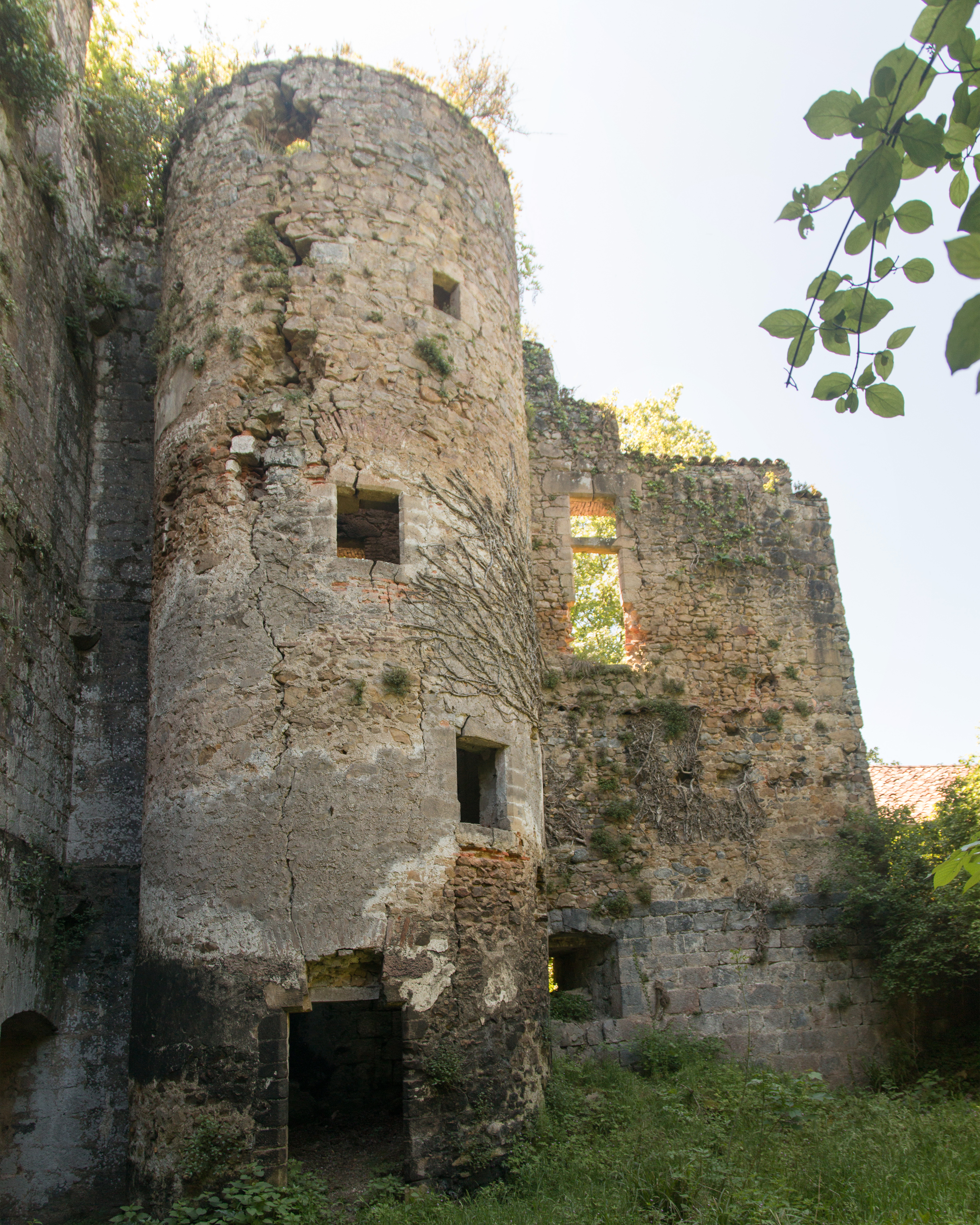 Castle of Saint Pée sur Nivelle